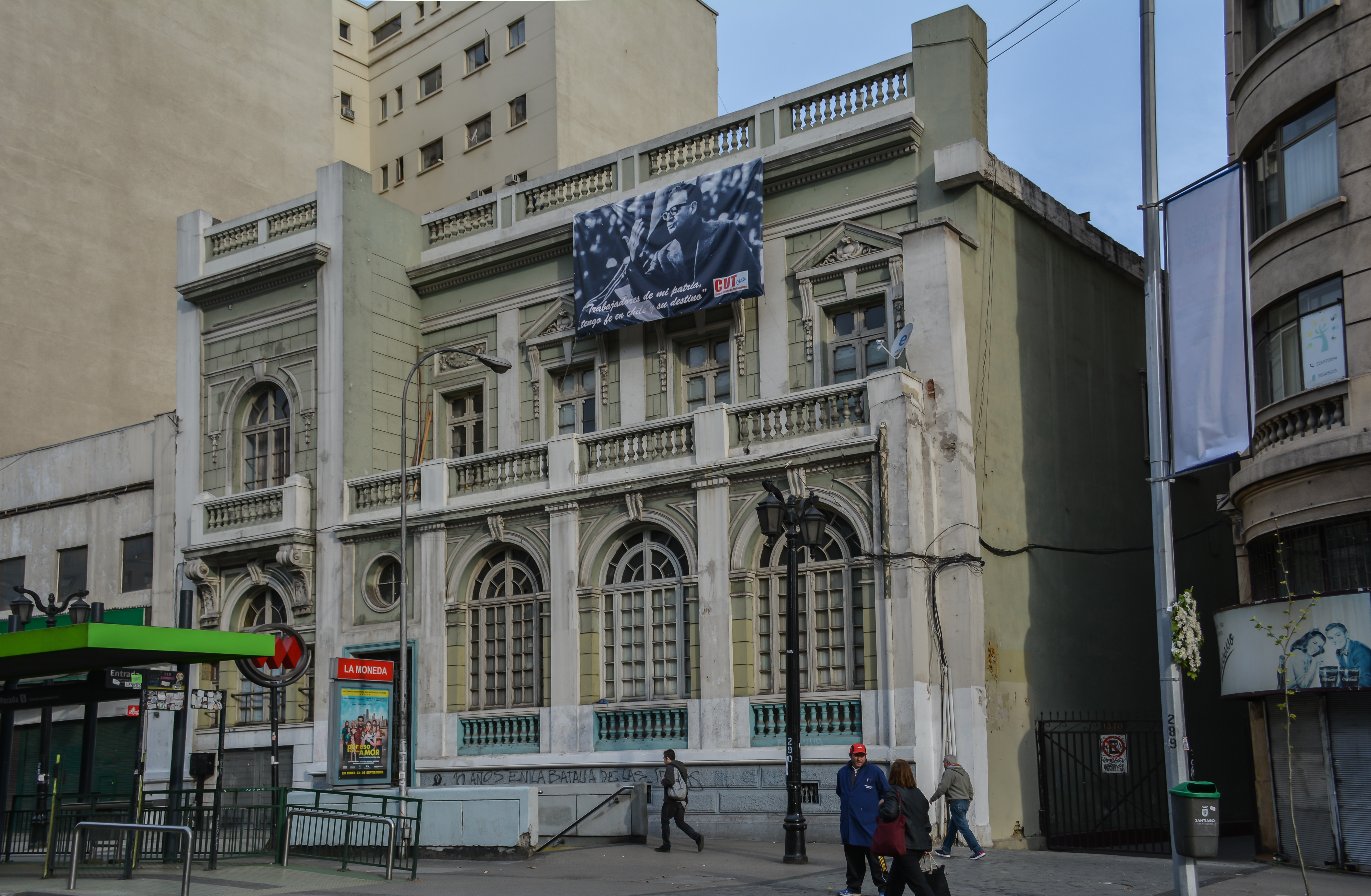 Casa Espínola Pereira, Santiago, Chile.